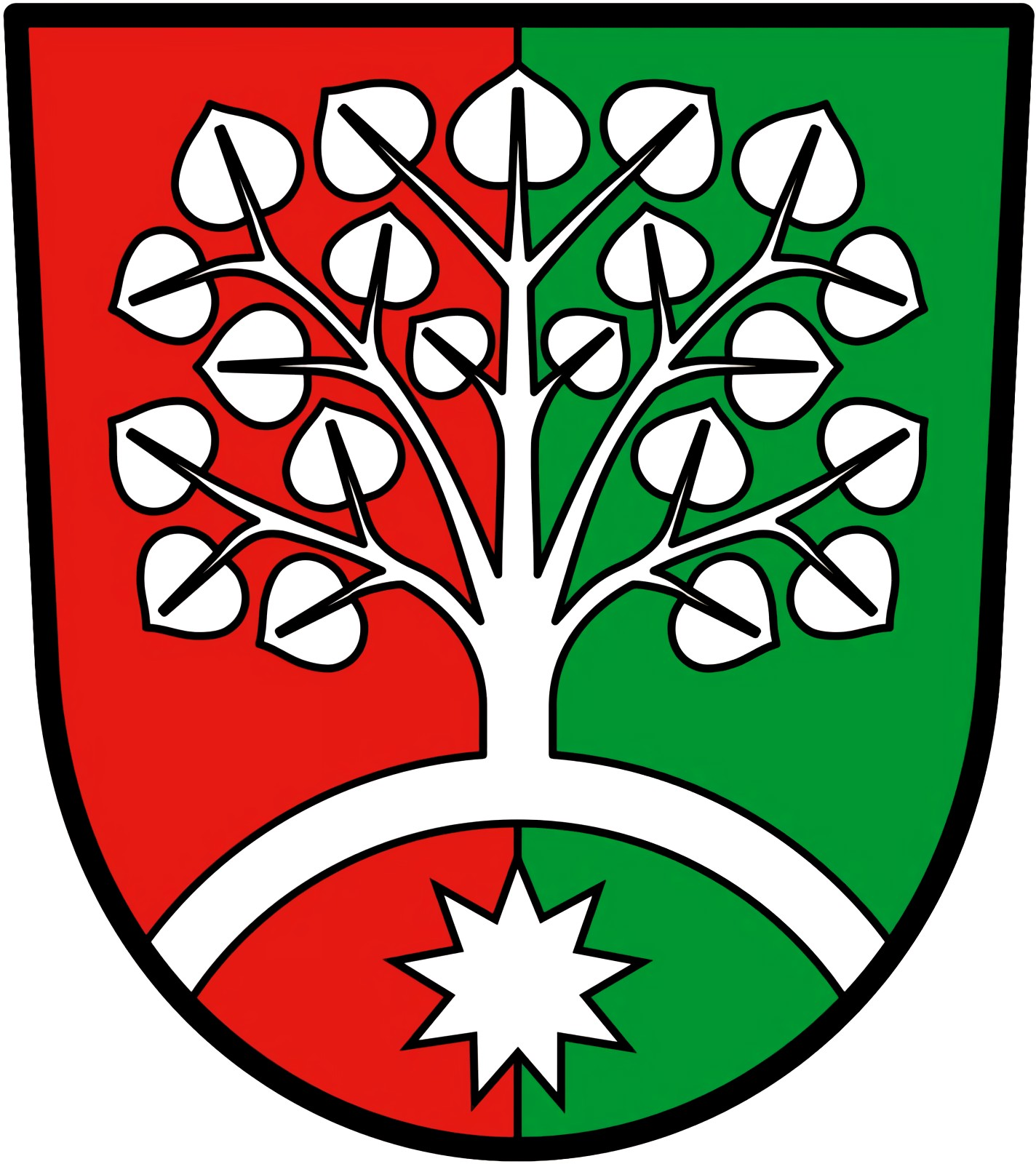 Znak obce Lipovec